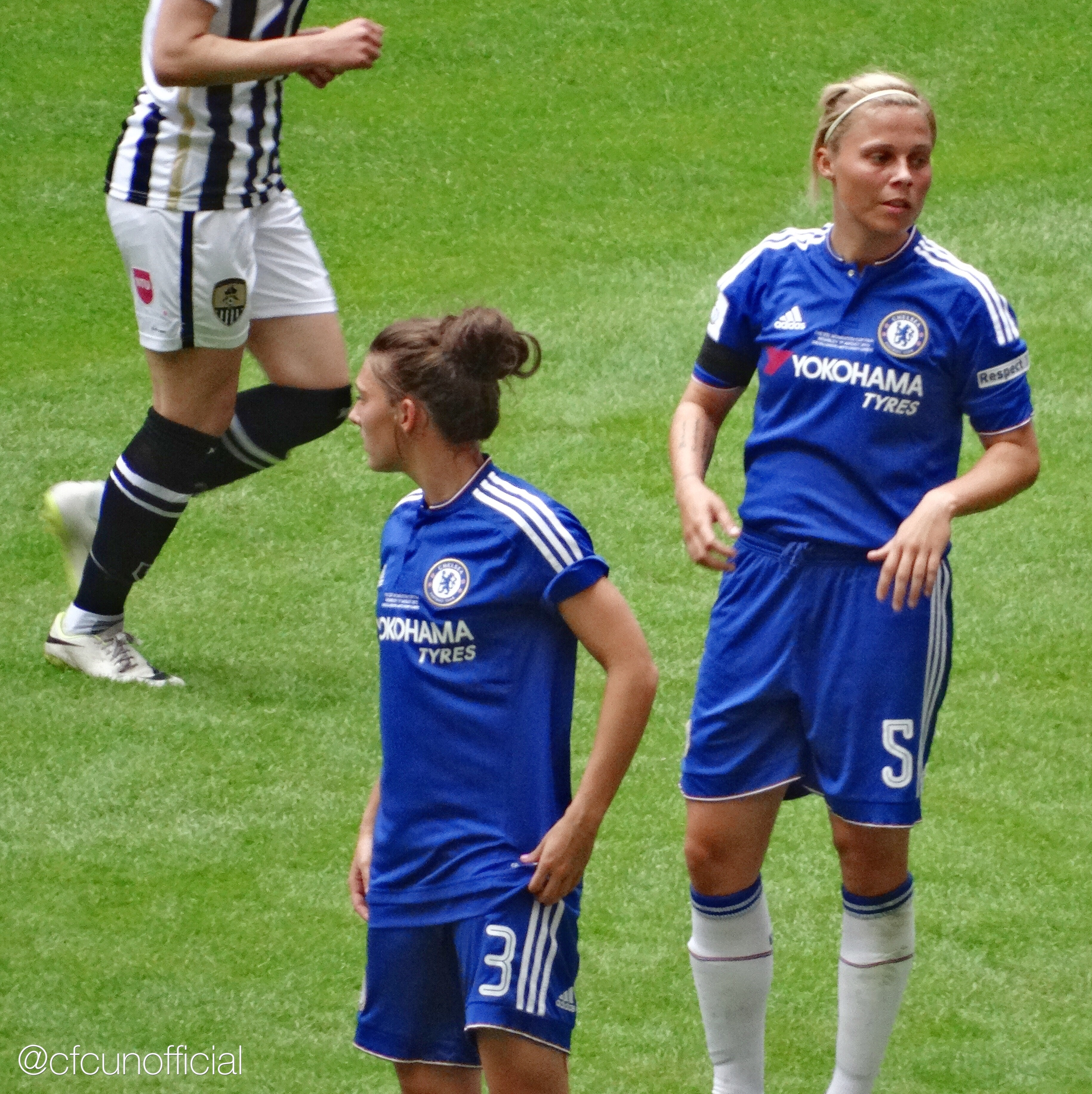 Blundell and Flaherty